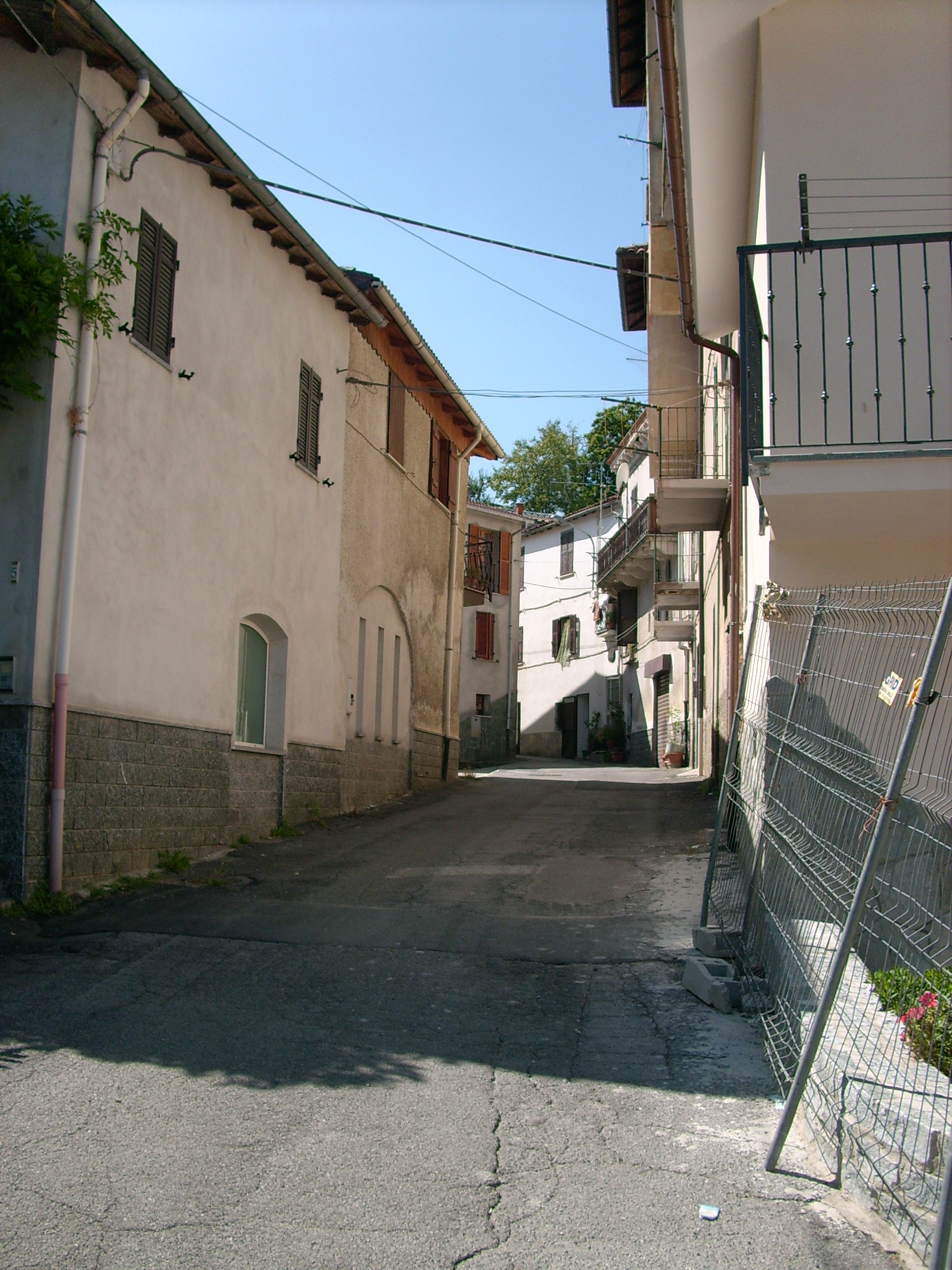 Roccavignale, Liguria, Italia